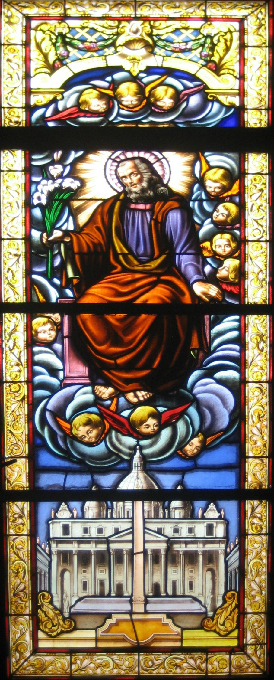 Cuba, Parroquia de San José de Jatibonico: 8-Vitral de San José Patrón Universal de la Iglesia.